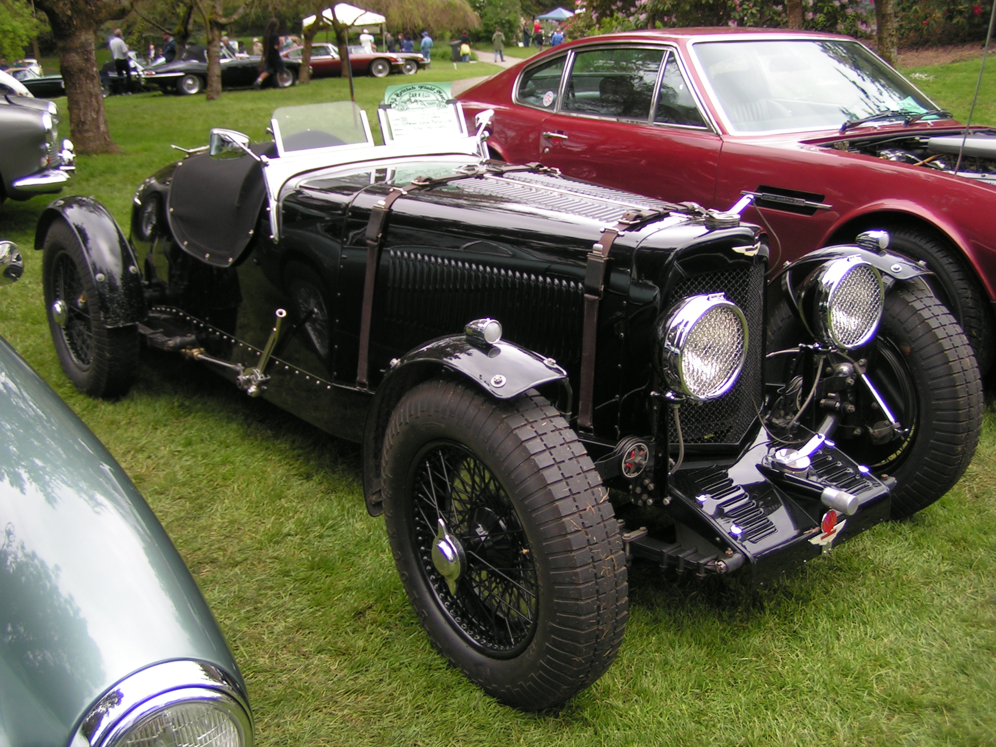 1934 Aston Martin Ulster1934 Aston Martin Ulster